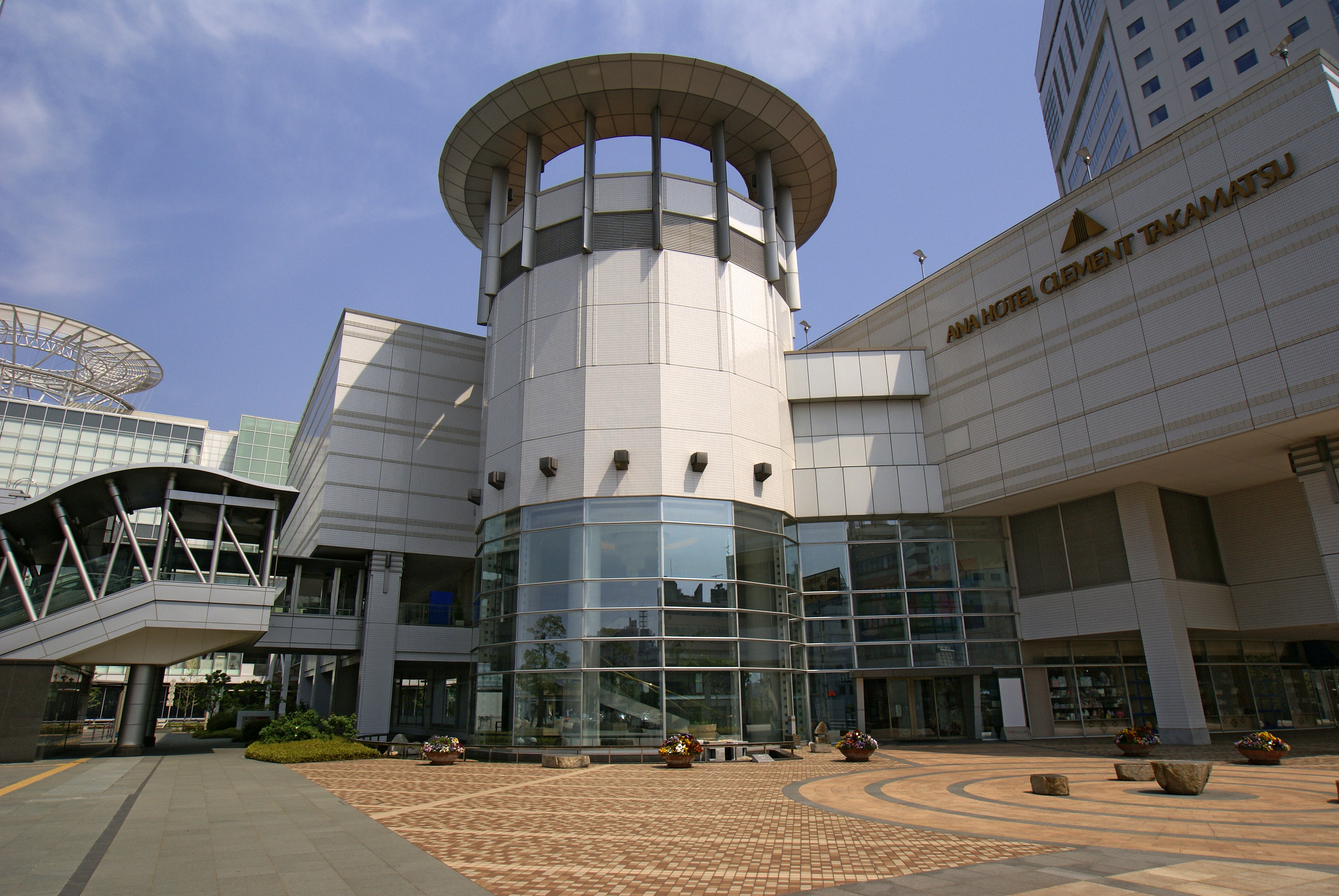 ANA Hotel Clement Takamatsu of Sunport-Takamatsu in Takamatsu, Kagawa, Japan